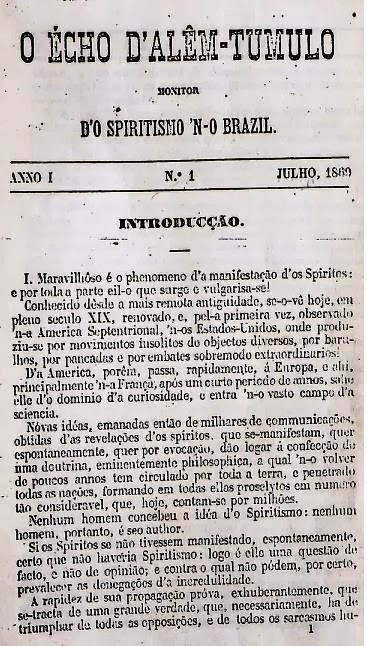 O éco de além túmulo